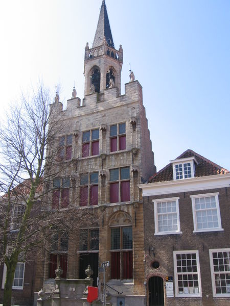 Tholen stadhuis